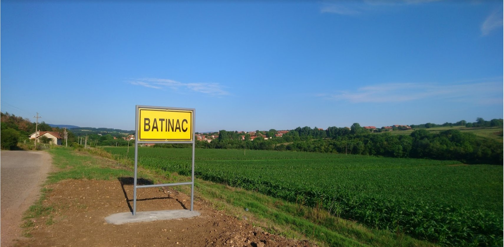 Улаз у Батинац